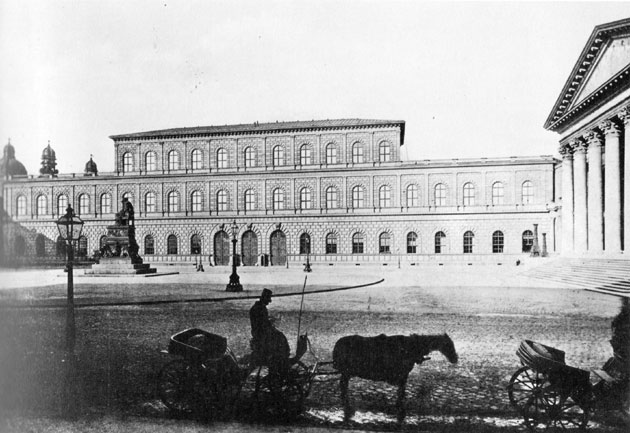 Der Max-Joseph-Platz in München